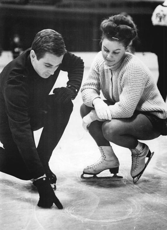 Gabriele Seyfert, Ralph Borghardt Zentralbild Kohls 10.1.1964 Deutsche Meisterschaften im Eiskunstlauf. Die Innsbruck-Fahrer Gabriele Seyfert und Ralph Borghardt liegen nach der Pflicht am ersten Tag der deutschen Meisterschaft im Eiskunstlauf in der Berliner Werner-Seelenbinder-Halle in Führung. In einer Wettkampfpause betrachteten sie gemeinsam eine Pflichtfigur.